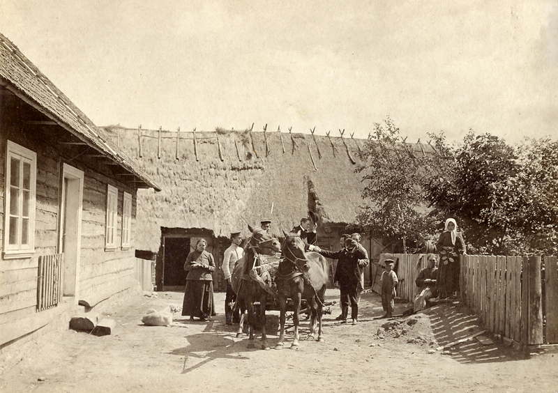 Balbieriškis, 1906